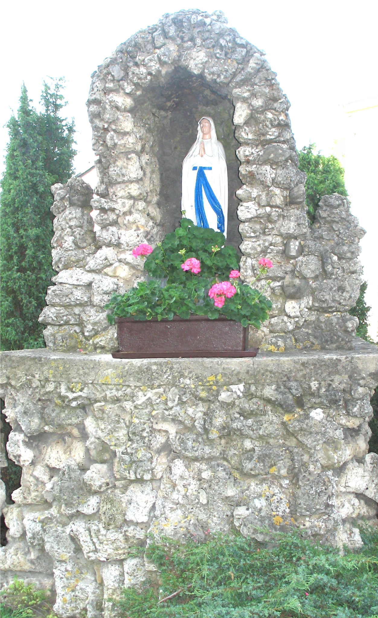 Grott bei der Kierch zu Biereng